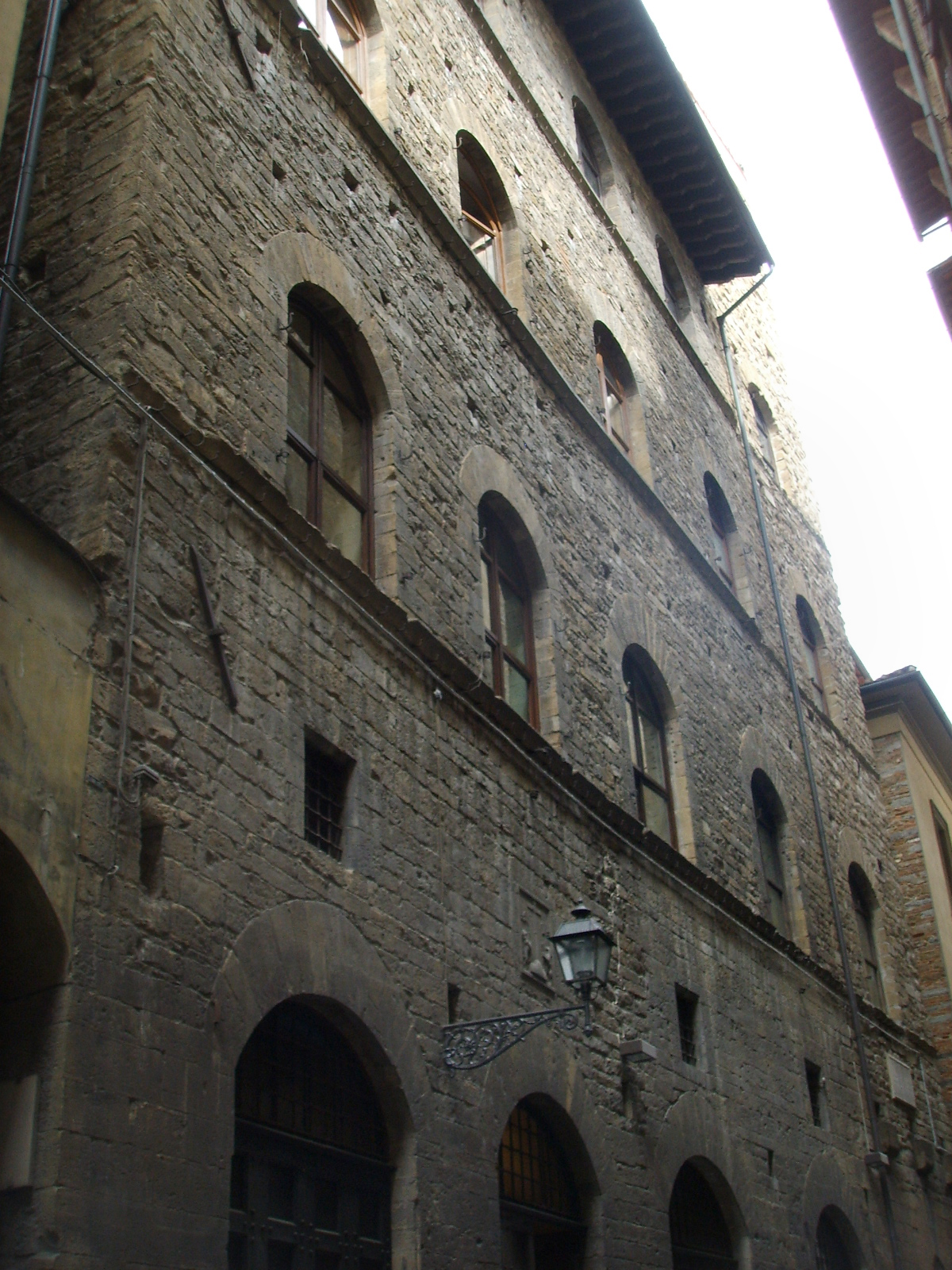 Palazzo acciaiuoli 11